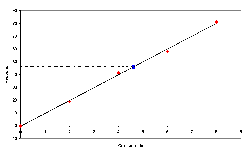 calibration line